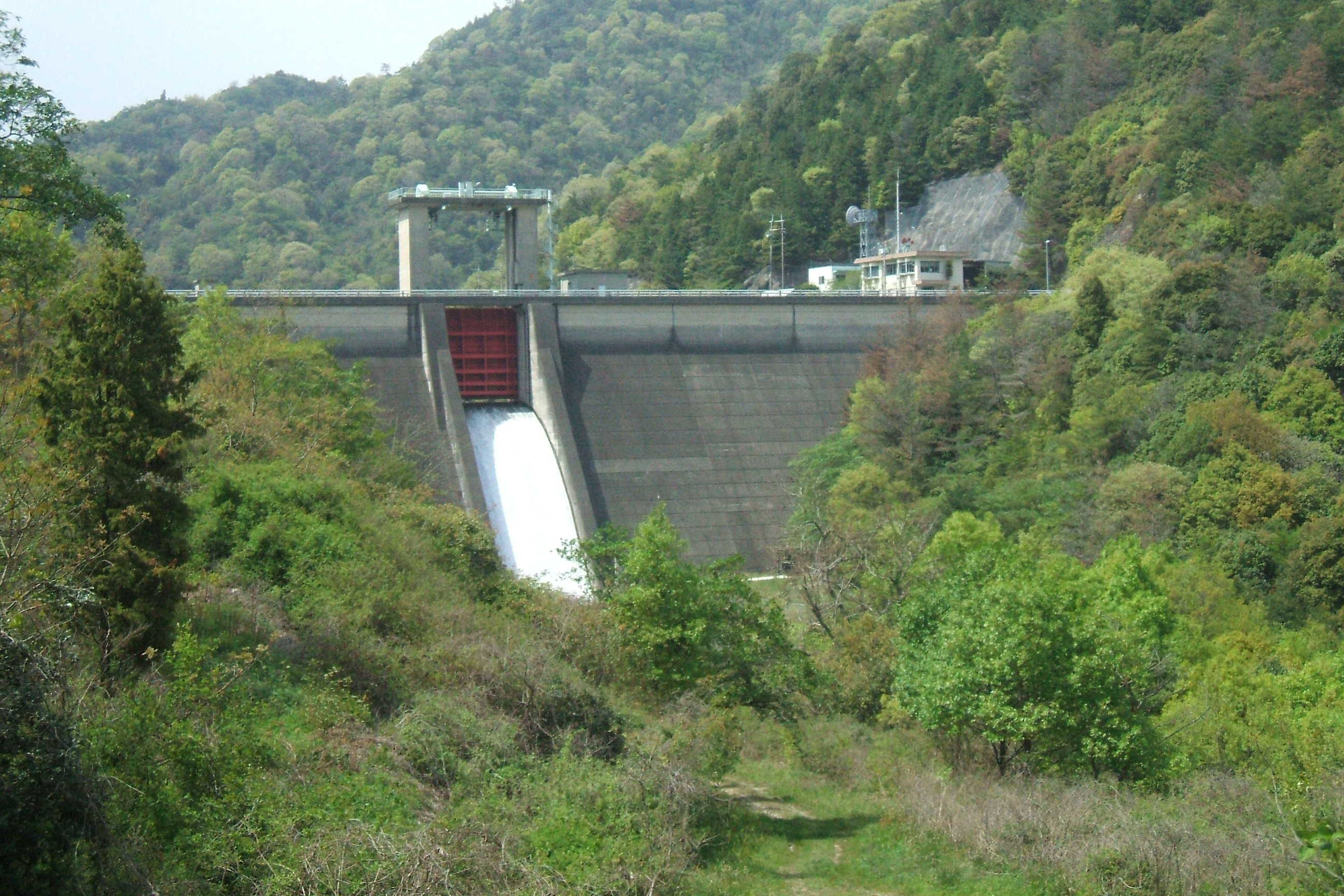 野呂川ダム堰堤の遠景